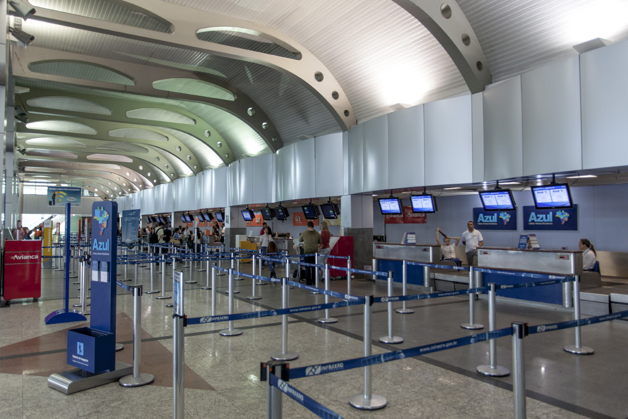 Área de check-in do Aeroporto Internacional de Salvador, em Salvador.